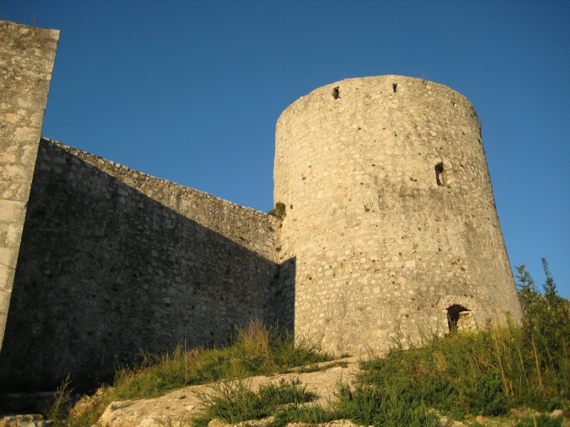 Gradina Drivenik, Croatia